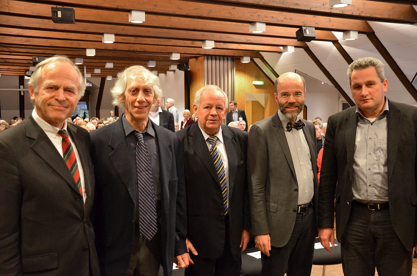 „Gerichtstag halten über uns selbst - die Strafverfolgung von NS-Verbrechen in Vergangenheit und Gegenwart" hieß die Vortragsreihe mit anschließender Diskussion, zu der das Oberlandesgericht Celle (OLG) in Zusammenarbeit mit der Stiftung niedersächsische Gedenkstätten geladen hatte. Den anwesenden Fotografen stellten sich hier (von links nach rechts): Peter Götz von Olenhusen (Präsident des OLG Celle), Rechtsanwalt Michael Horowitz aus Jerusalem (ehemals einer der leitenden Staatsanwälte in dem 2011 abgeschlossenen Prozess gegen den ehemaligen KZ-Aufseher John Demjanjuk), Staatsanwalt Kurt Schrimm (Leiter der Zentralen Stelle der Landesjustizverwaltungen zur Aufklärung nationalsozialistischer Verbrechen in Ludwigsburg), Thomas Henne (Professor am Lehrstuhl für Rechtsgeschichte, juristische Zeitgeschichte und Rechtstheorie der Universität Luzern), sowie Jens-Christian Wagner (Geschäftsführer der Stiftung niedersächsische Gedenkstätten) ...